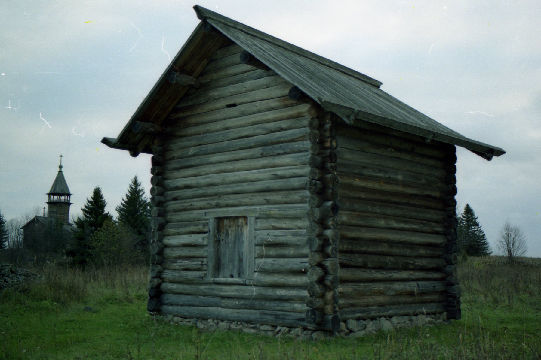 Амбар из д. Сяппяваара (Республика Карелия, Медвежьегорск, о. Кижи, музей-заповедник деревянного зодчества "Кижи")